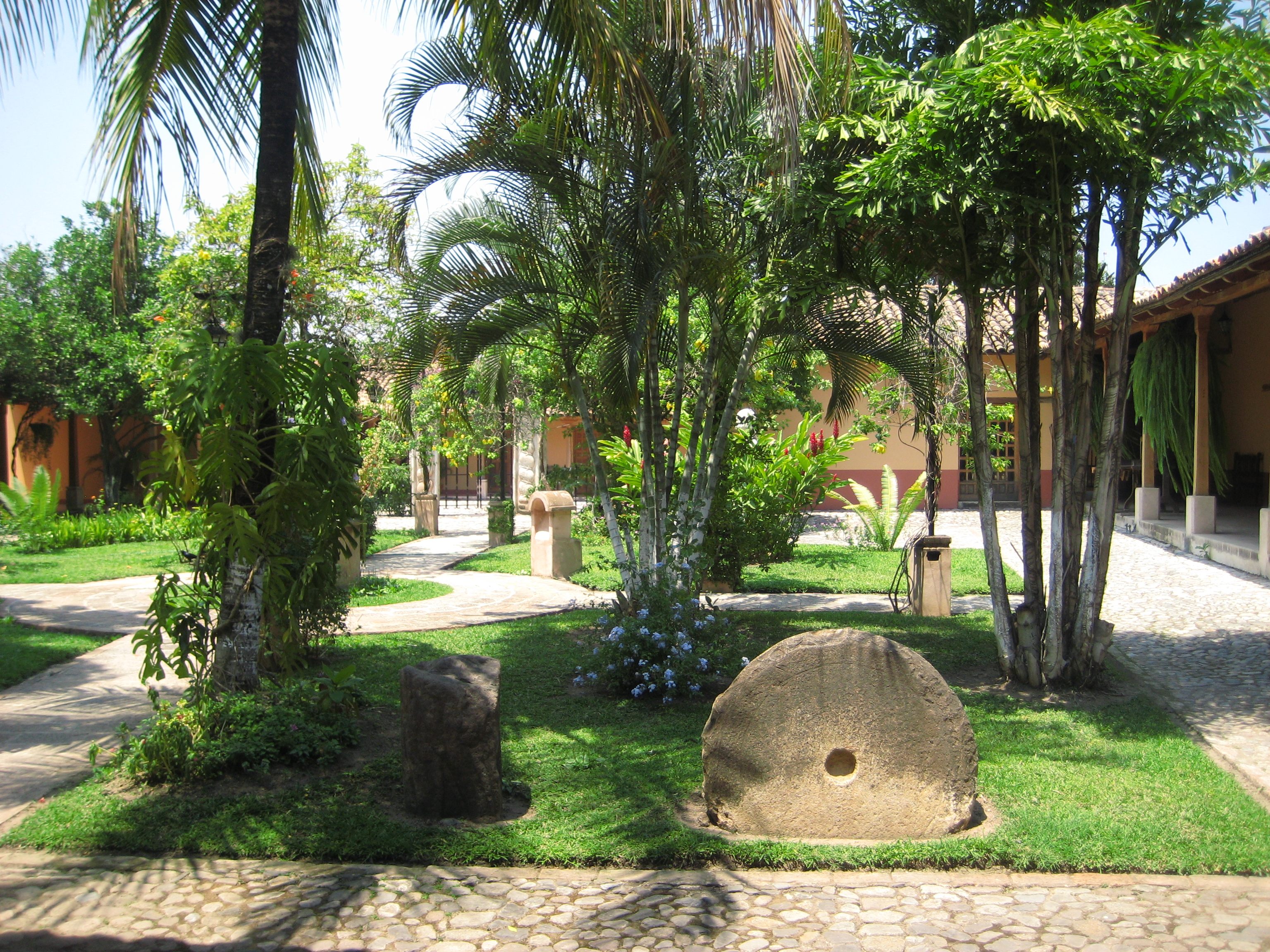 Comayagua Museum